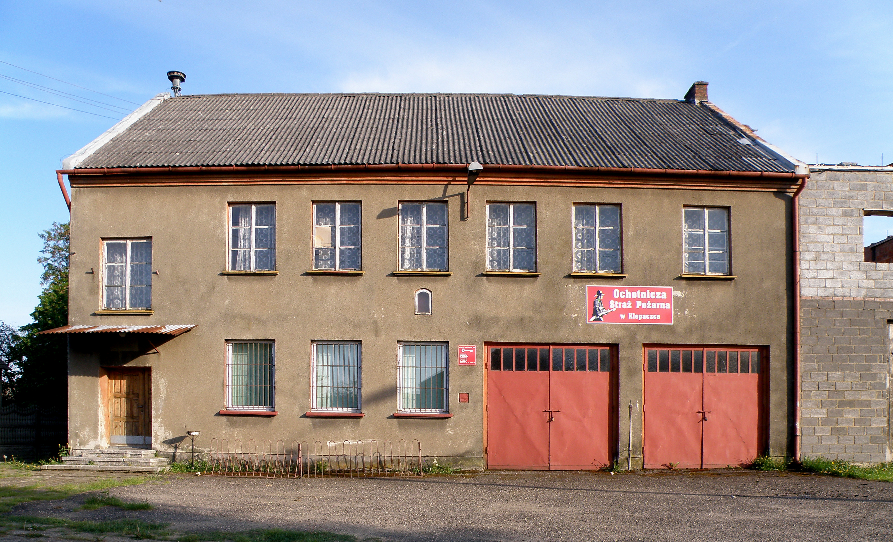 Remiza strażacka w Klepaczce